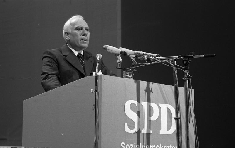 Außerordentlicher Parteitag der SPD in der Westfalenhalle Dortmund 18.-19.6.1976